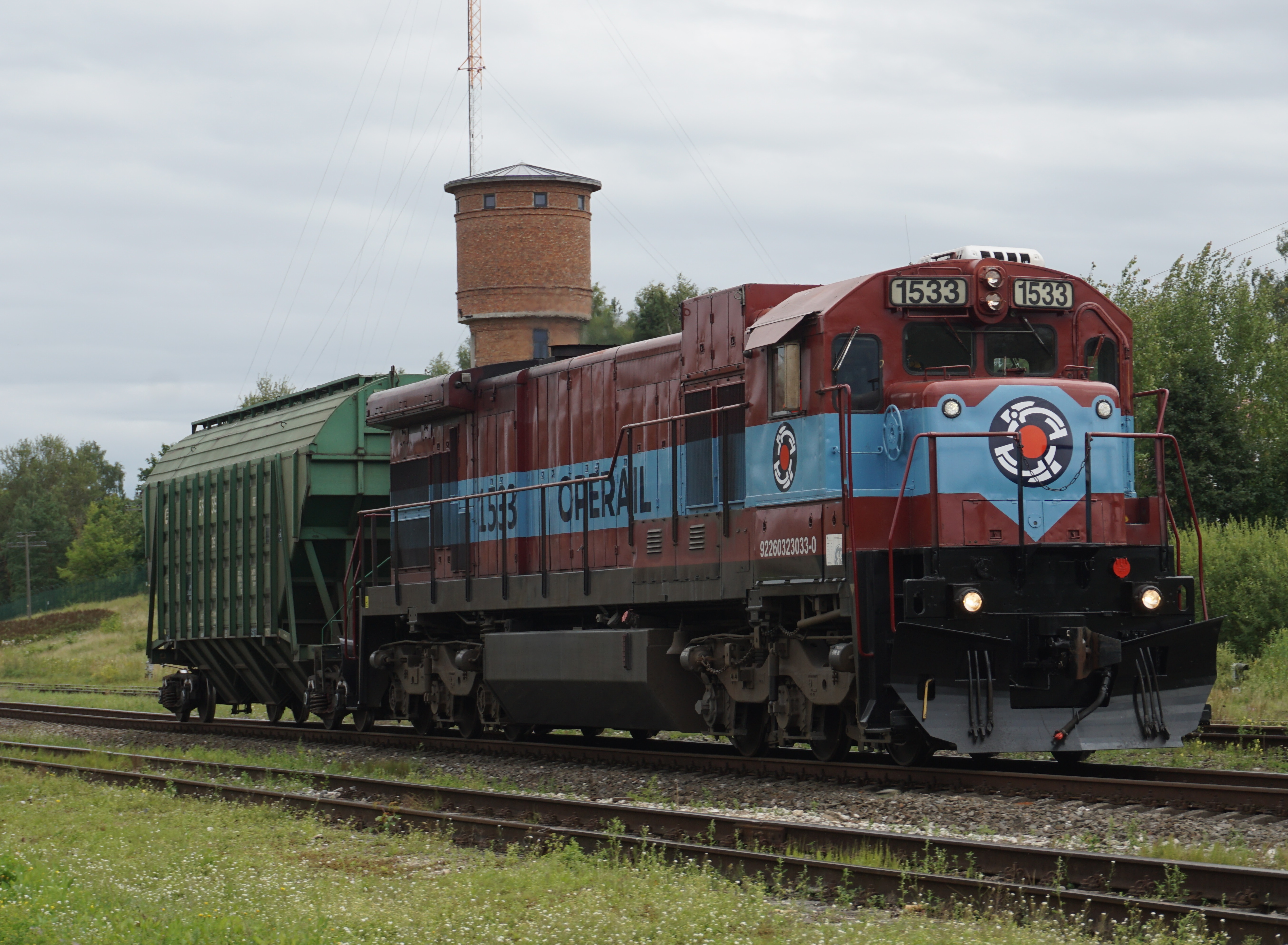 Kaubarong Võru raudteejaamas, esiplaanil Ameerika päritolu vedur C36-7i-1533